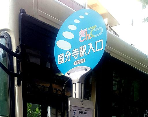 GINGA-TETSUDO